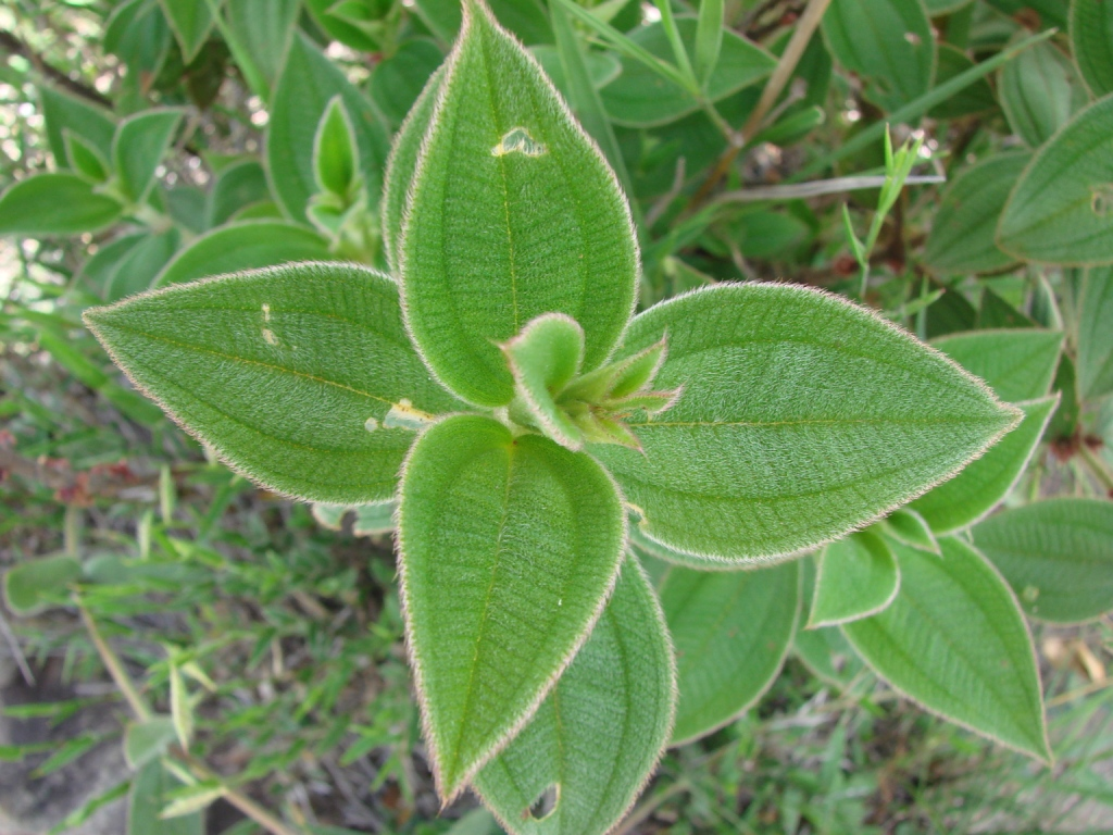 Clidemia rubra (Aubl.) Mart. - MELASTOMATACEAE - Chapada Imperial - Distrito Federal - Brasil.